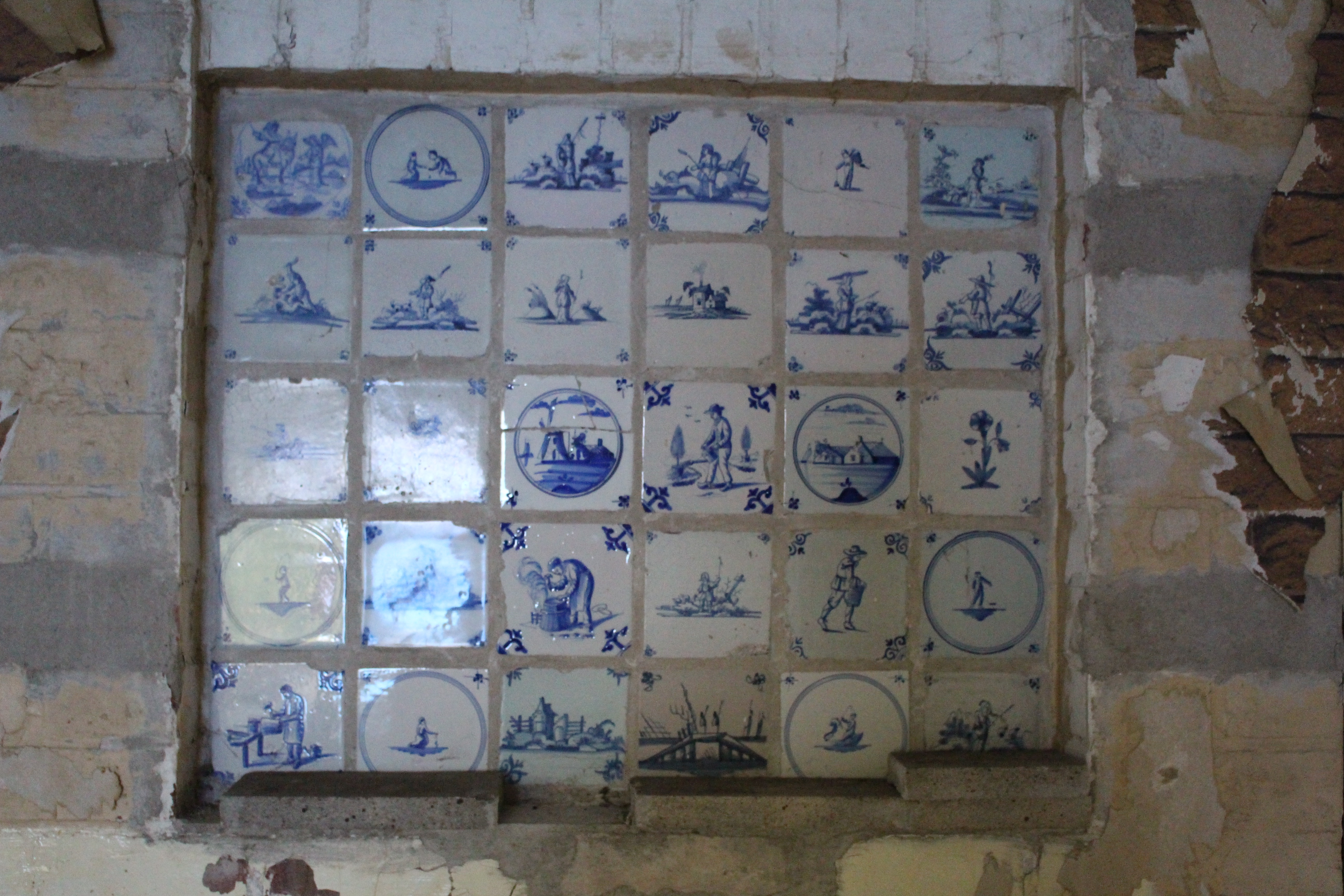 Delfter Kacheln im Alexander-Haus in Groß Glienicke